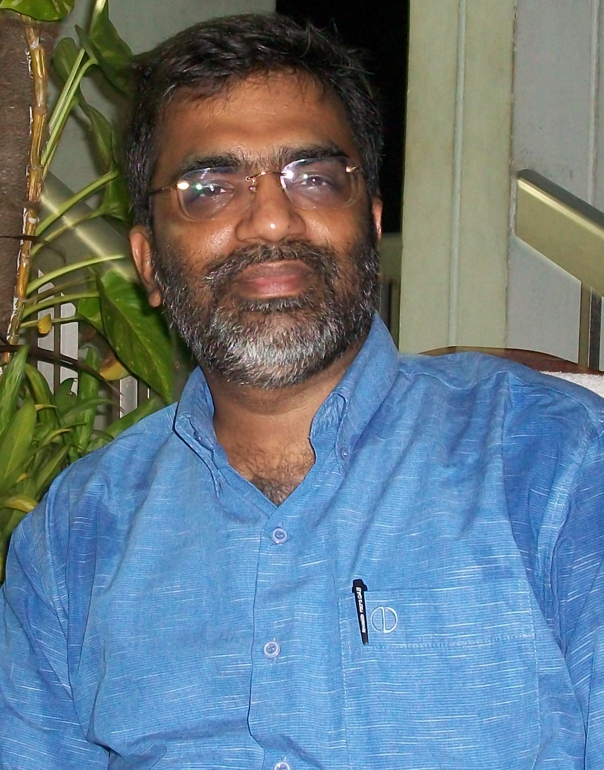 മലയാളി ശാസ്ത്രജ്ഞൻ ടി. പ്രദീപ്